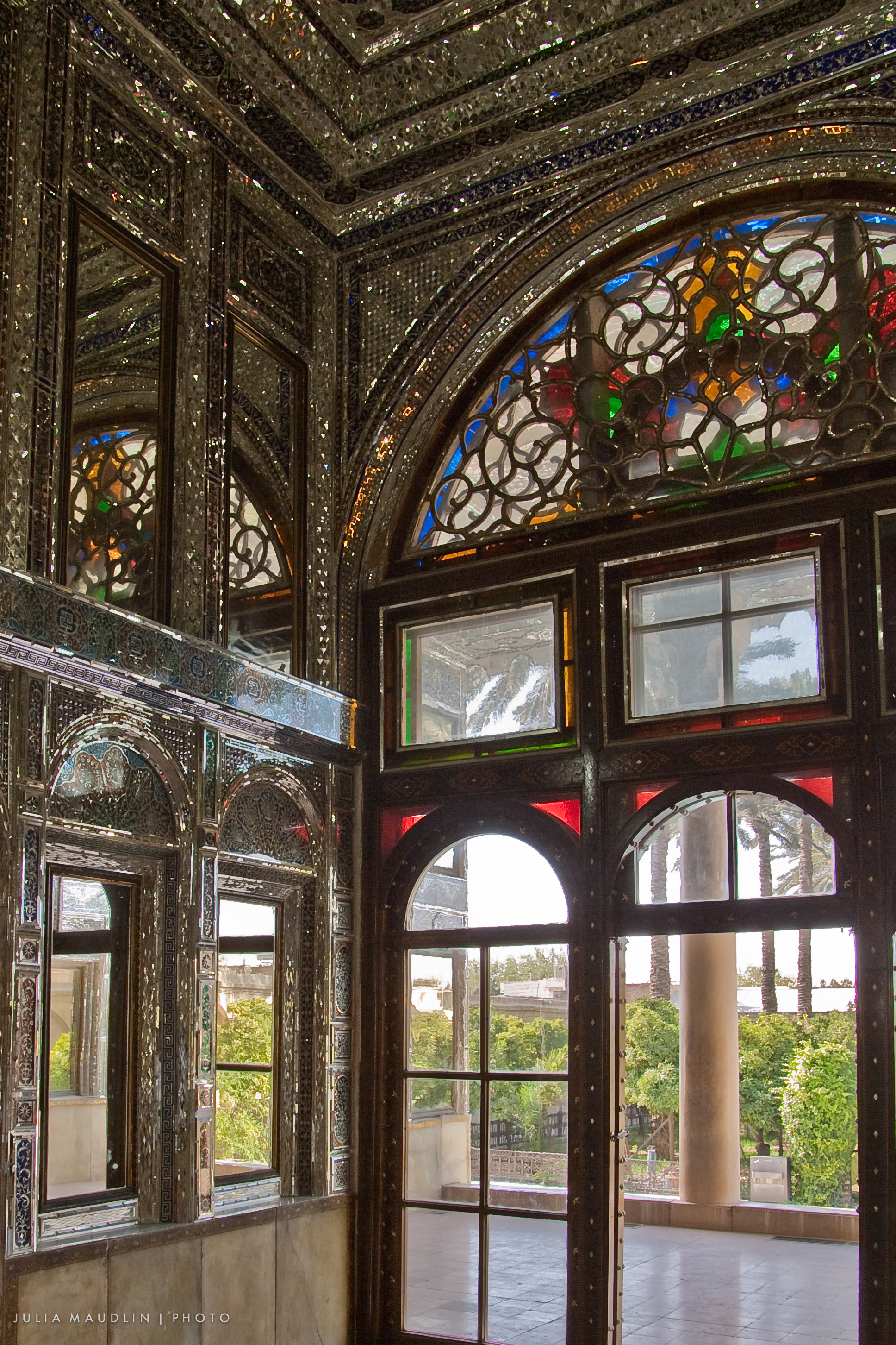 Mirrored Hall, Naranjastan Palace, Shiraz